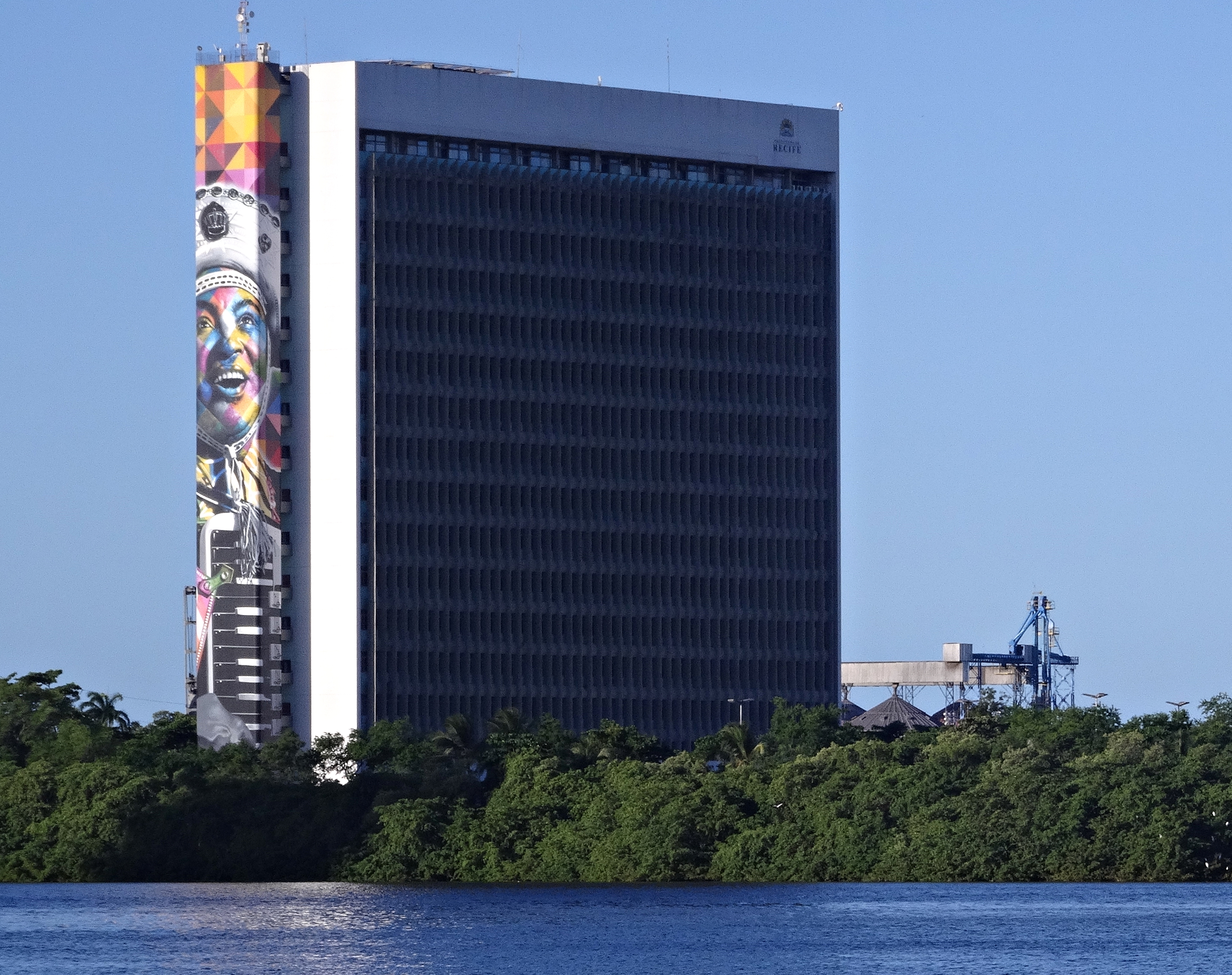 Prefeitura do Recife, com painel de Eduardo Kobra retratando o músico Luiz Gonzaga — Recife, Pernambuco, Brasil.